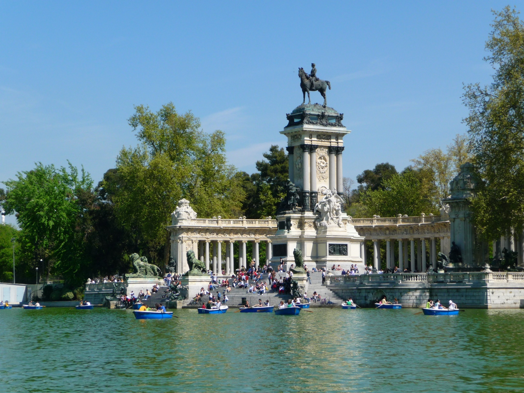 Parque del Retiro en Madrid, monumento a Alfonso XIII